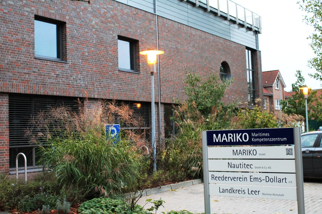 Das Gebäude der Mariko in Leer